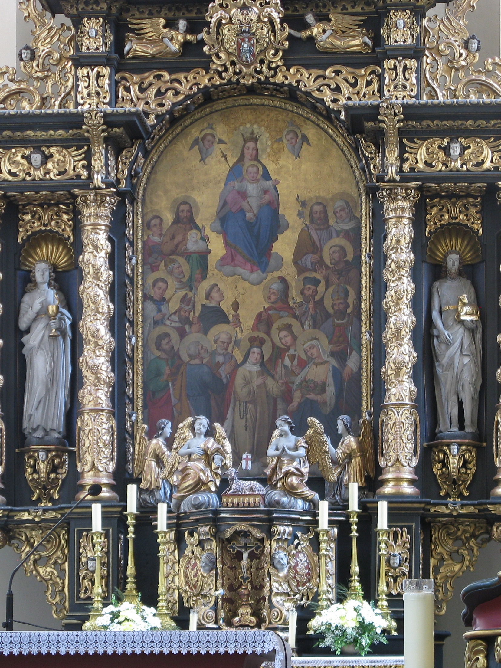 Obraz Matki Bożej w otoczeniu świętych w ołtarzu głównym kościoła Wszystkich Świętych w Gliwicach.